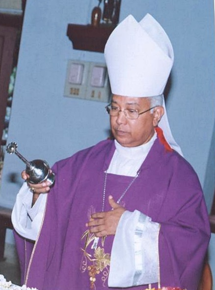 Bischof Stanley Roman (*1941) from Quilon, Kerala, India